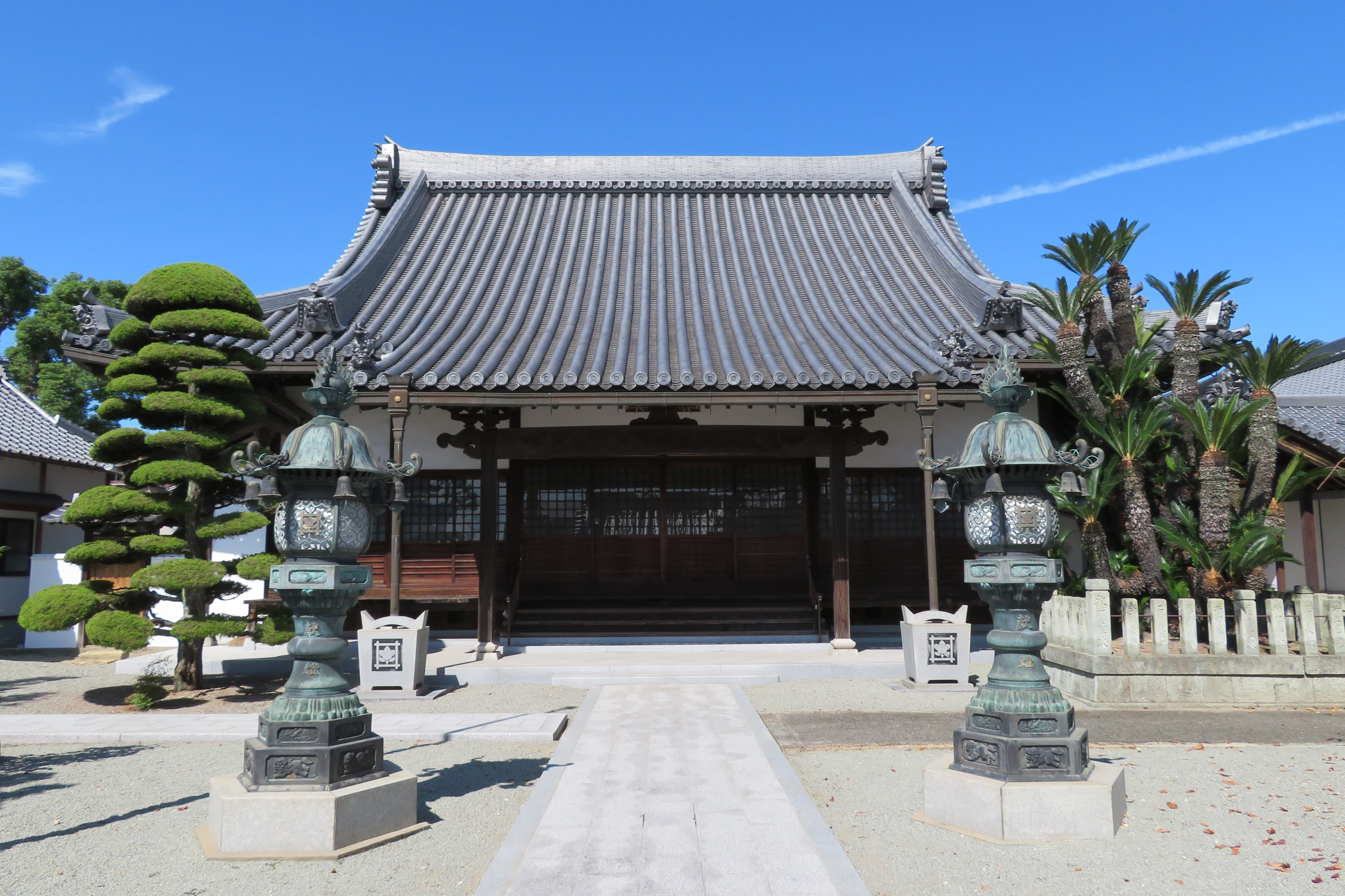 姫路市の法華寺